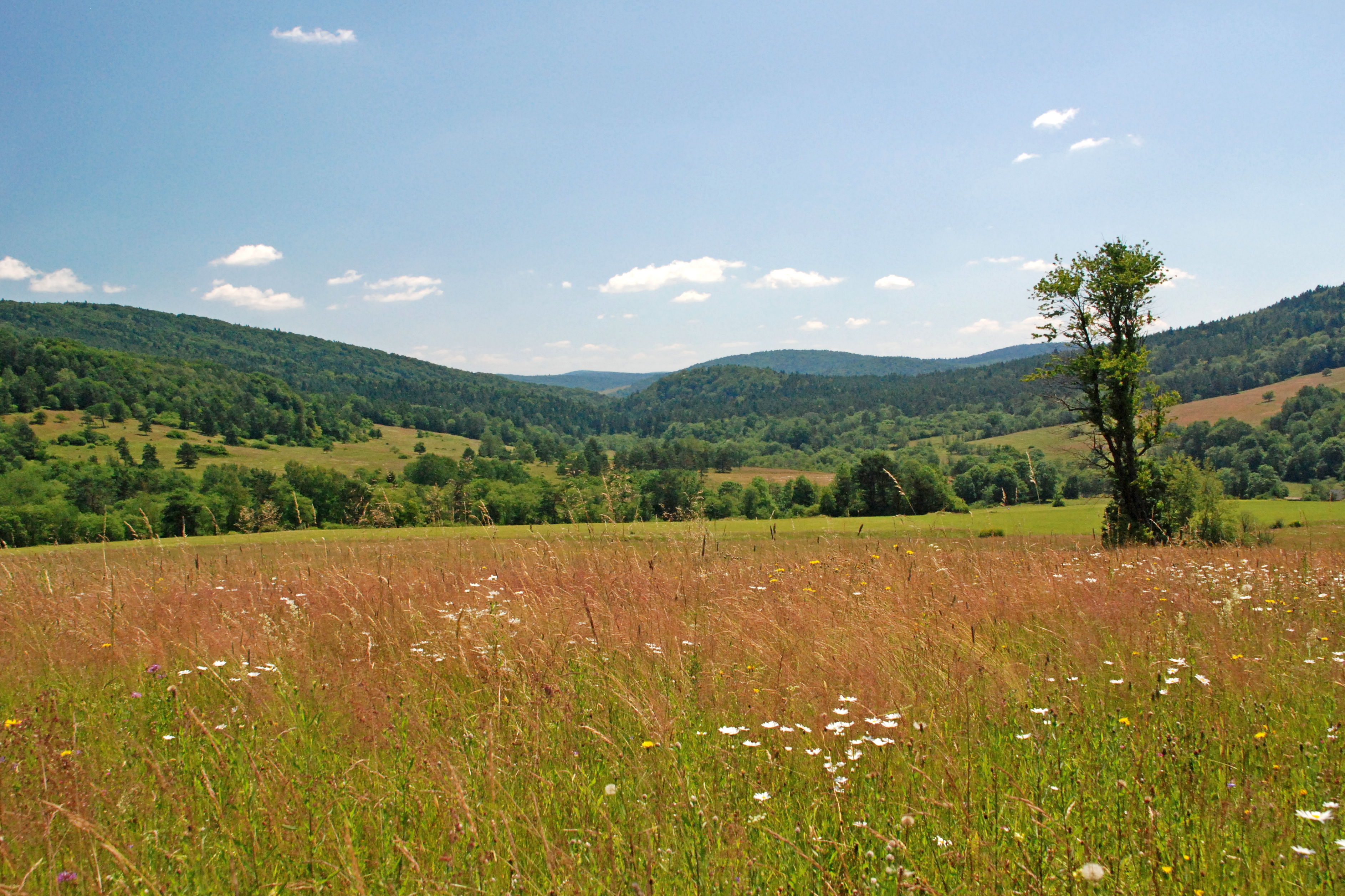 wieś Wołowiec